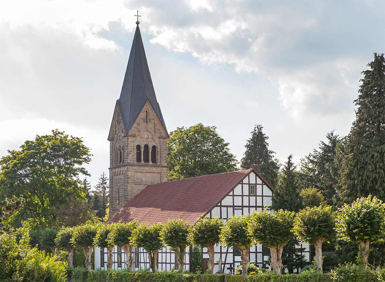 Evangelische Kirche Bergkirchen, Bad Salzuflen This is a photograph of an architectural monument.